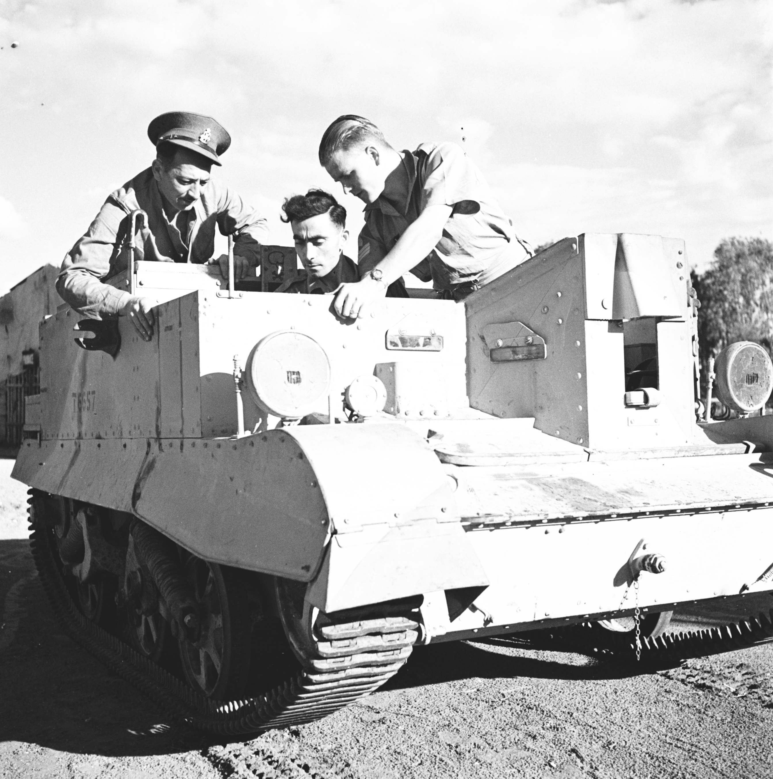 אוסף צילומים של הצלם זולטן קלוגר טווח מספרי התשלילים 16431 - 16466: RAOC (Royal Army Ordnance Corps)